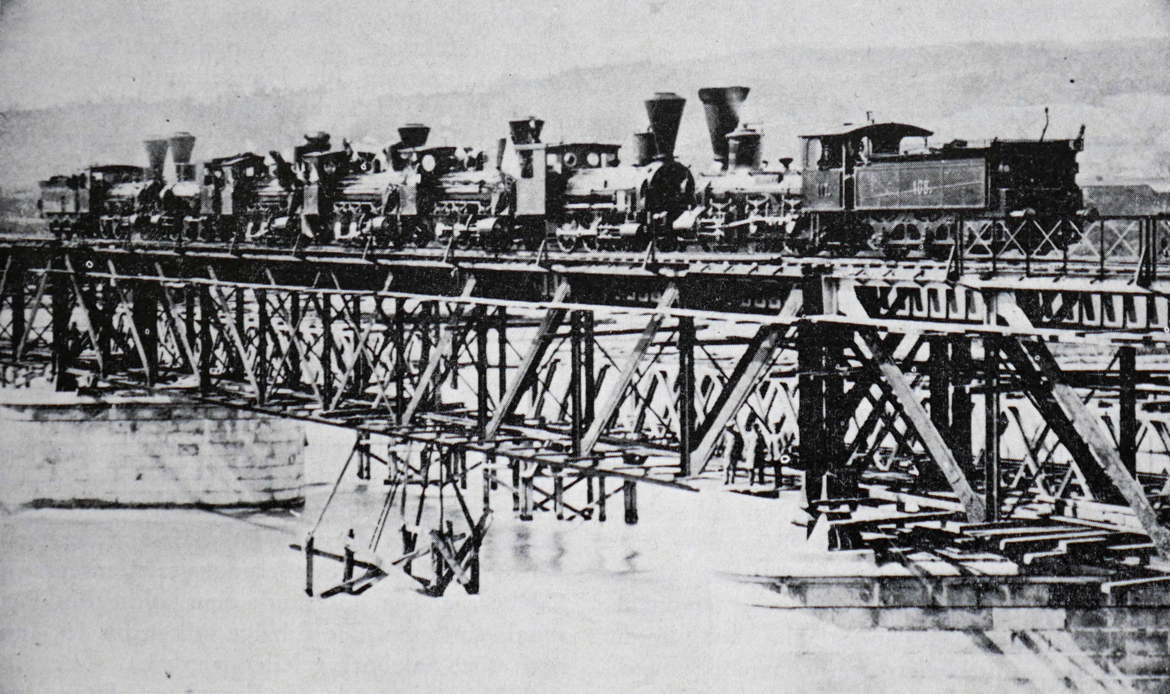 Belastungsprobe der Eisenbahnbrücke über den Inn zwischen Simbach und Braunau am 22. Mai 1871 mit sieben Dampflokomotiven, darunter vier Lokomotiven der Kaiserin Elisabeth Bahn und drei bayerischen Güterzuglokomotiven der Gattung C III